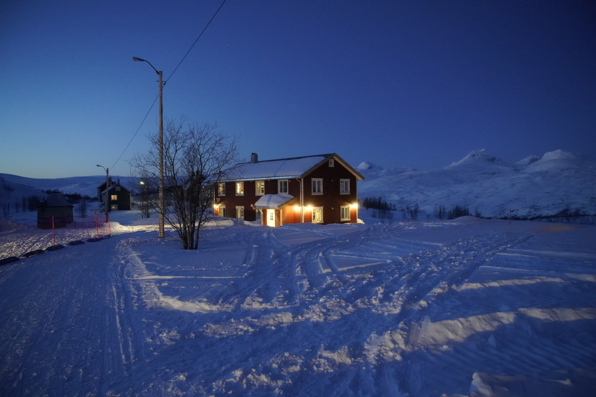 Messa på Jakobsbakken. Foto: Svein Spjelkavik